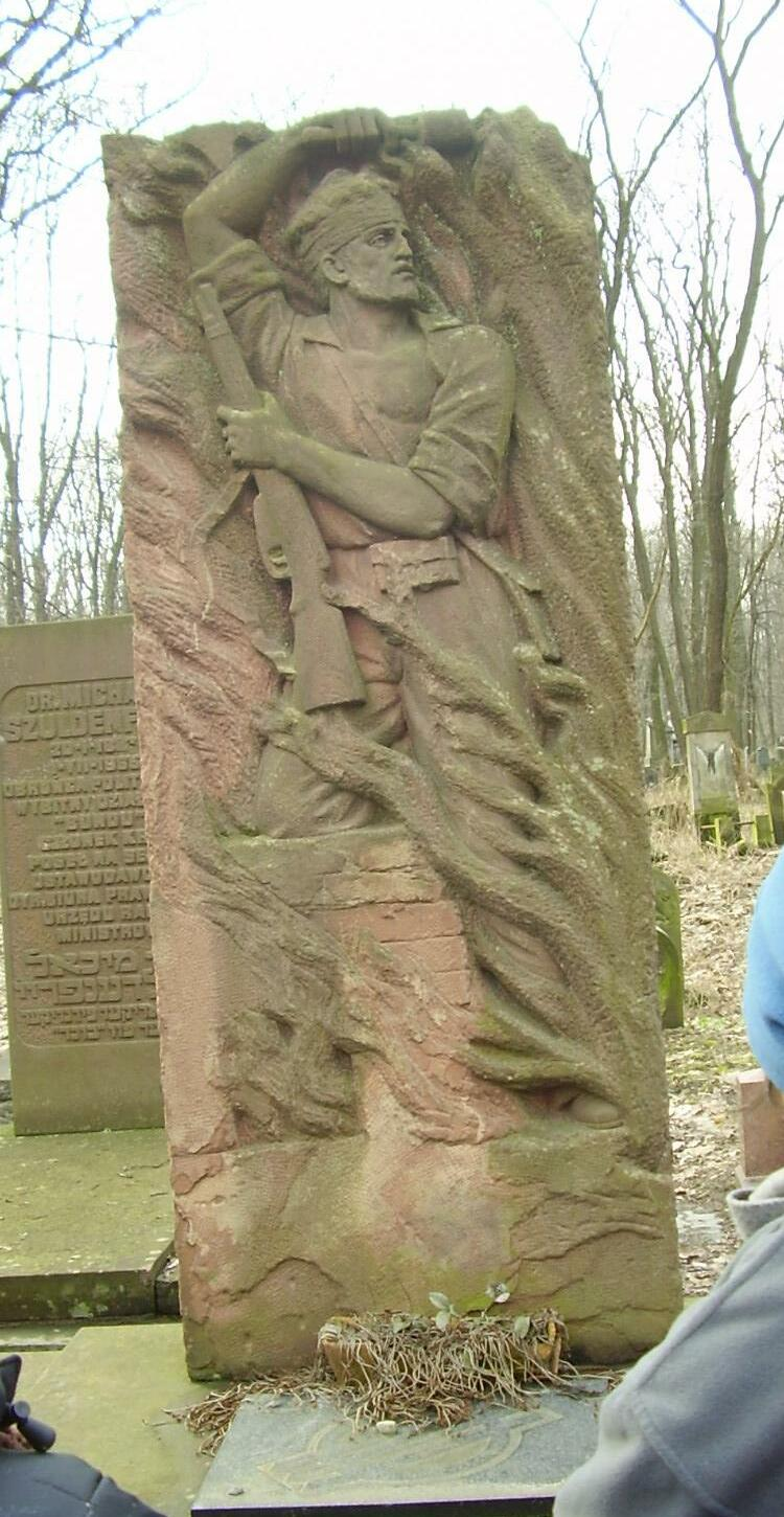 Monument au Bund au cimetière juif de Varsovie.